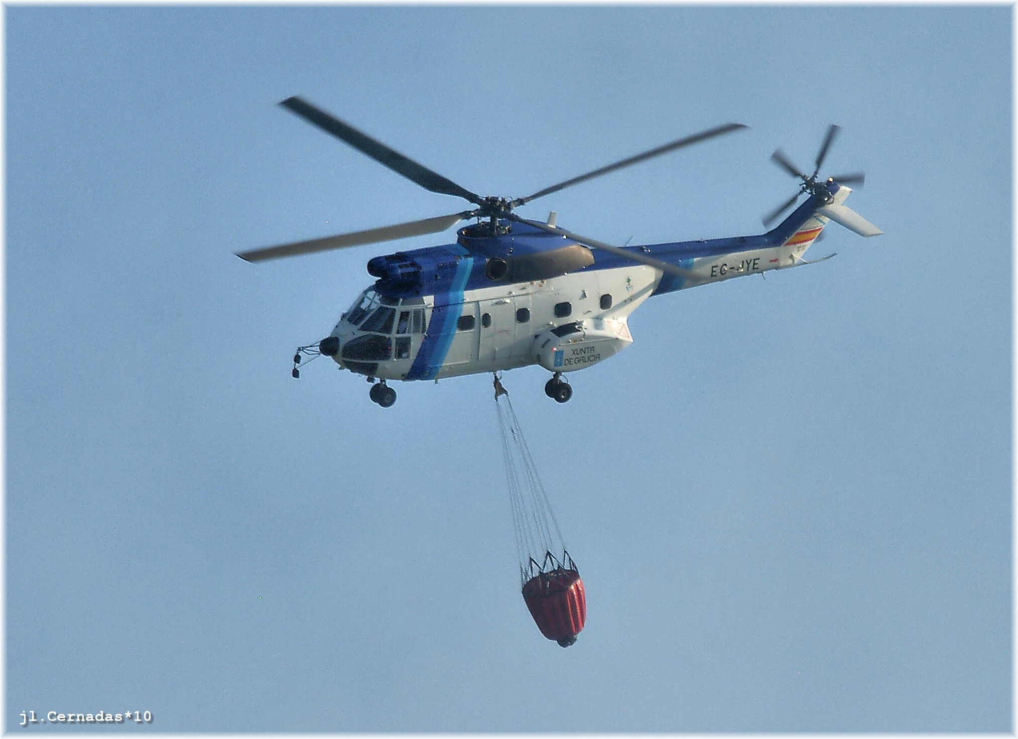 Homenaxe os bombeiros mortos esta noite loitando co lume nun monte de Pontevedra. Esta foto tomouse tamen en Pontevedra este sabado pasado dende o Castelo de Soutomaior, facendo un traballo excelente estes homes. O pior e que son intencionados esta peste de lumes.